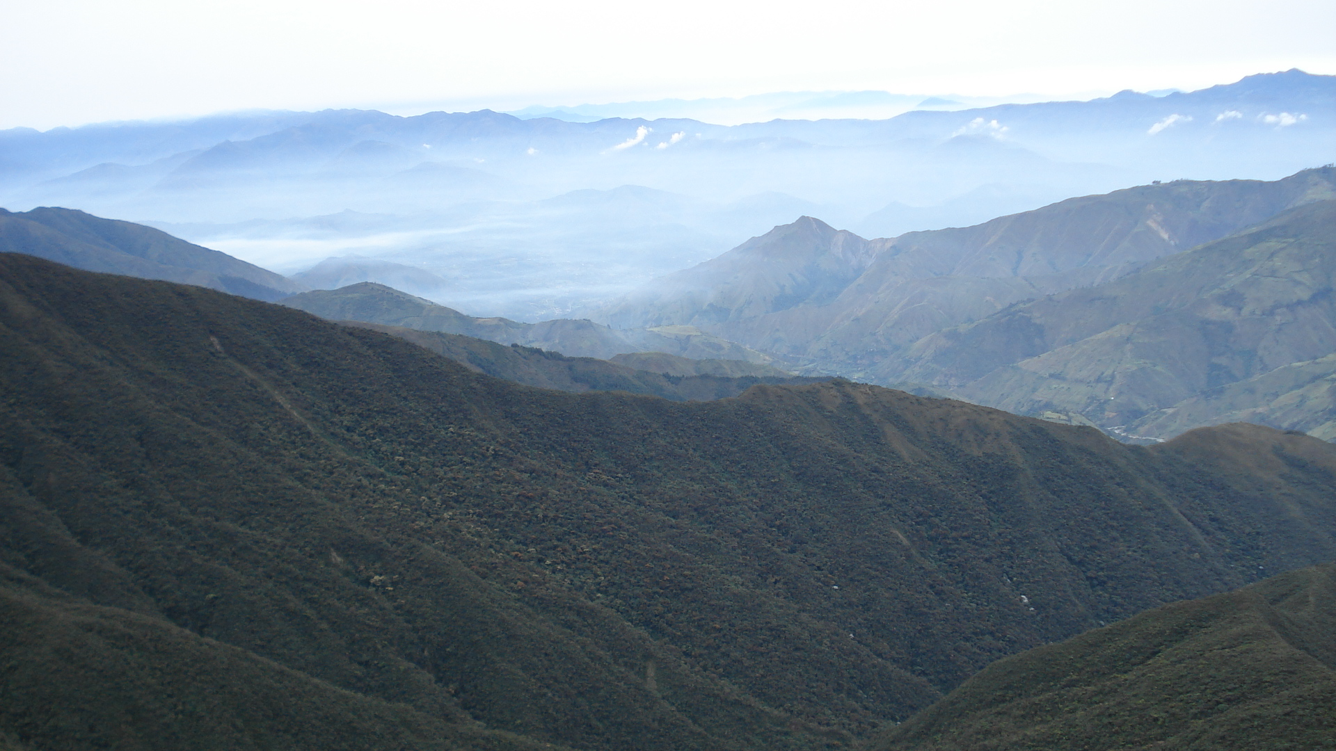 Por el filo de la Cordillera se camina 14 kilómetros hasta llegar a la primera Laguna que forma parte del Sistema Lacustre de las Lagunas del compadre